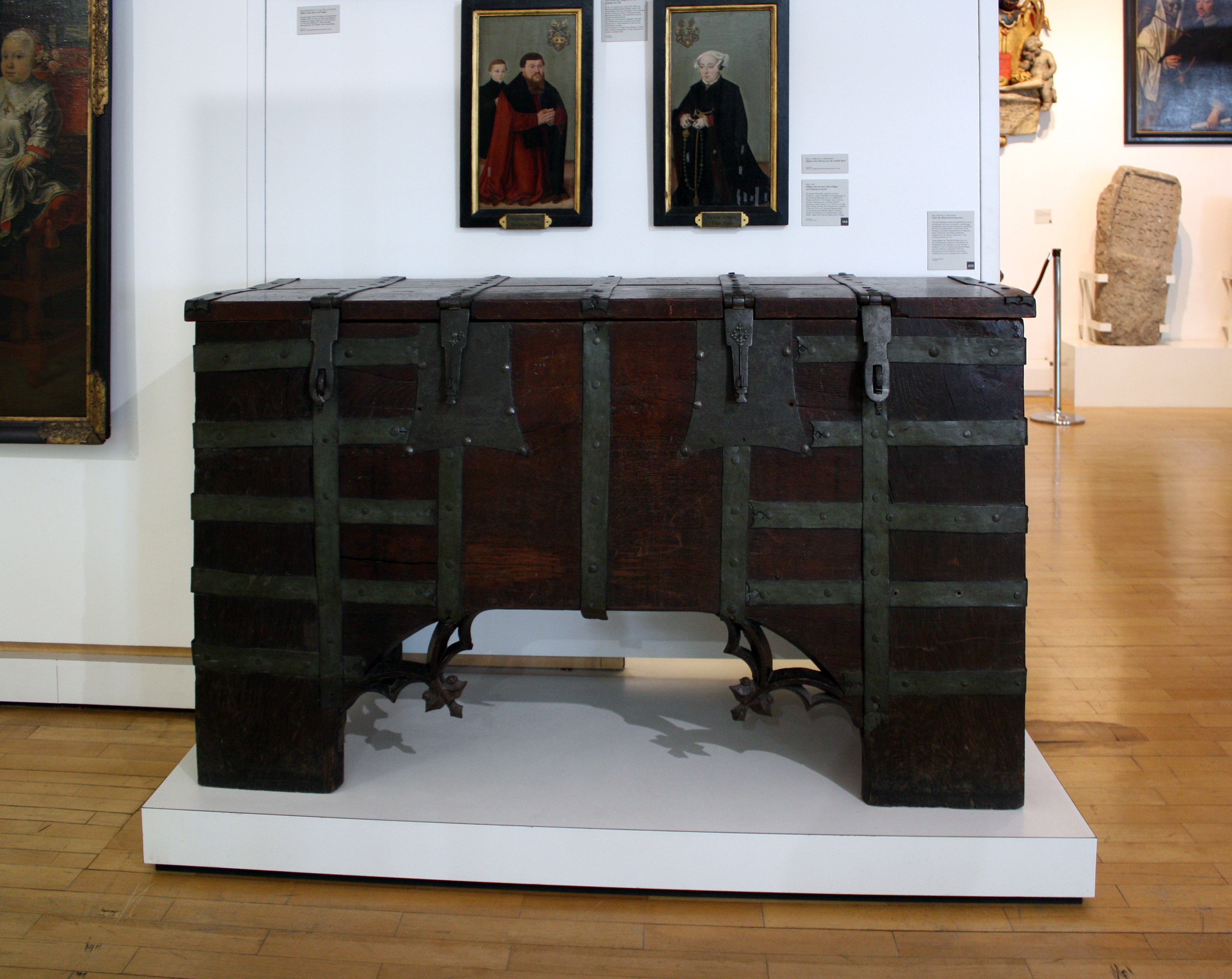 Köln, Truhe der Mittwochsrentkammer. Ende des 15. Jahrhunderts. Die mit Eisenbeschlägen und vier Schlössern gesicherte Truhe diente der Aufbewahrung städtischer Wertsachen und Akten. (Zeughaus Köln)